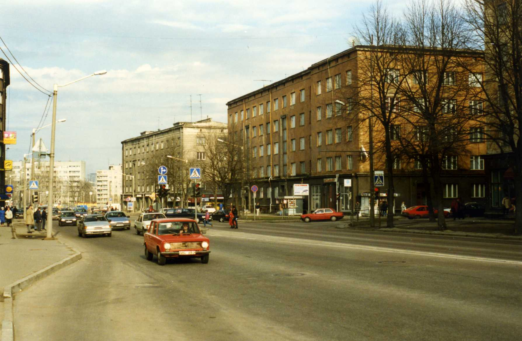 Liivalaia street, Tallinn, 1996